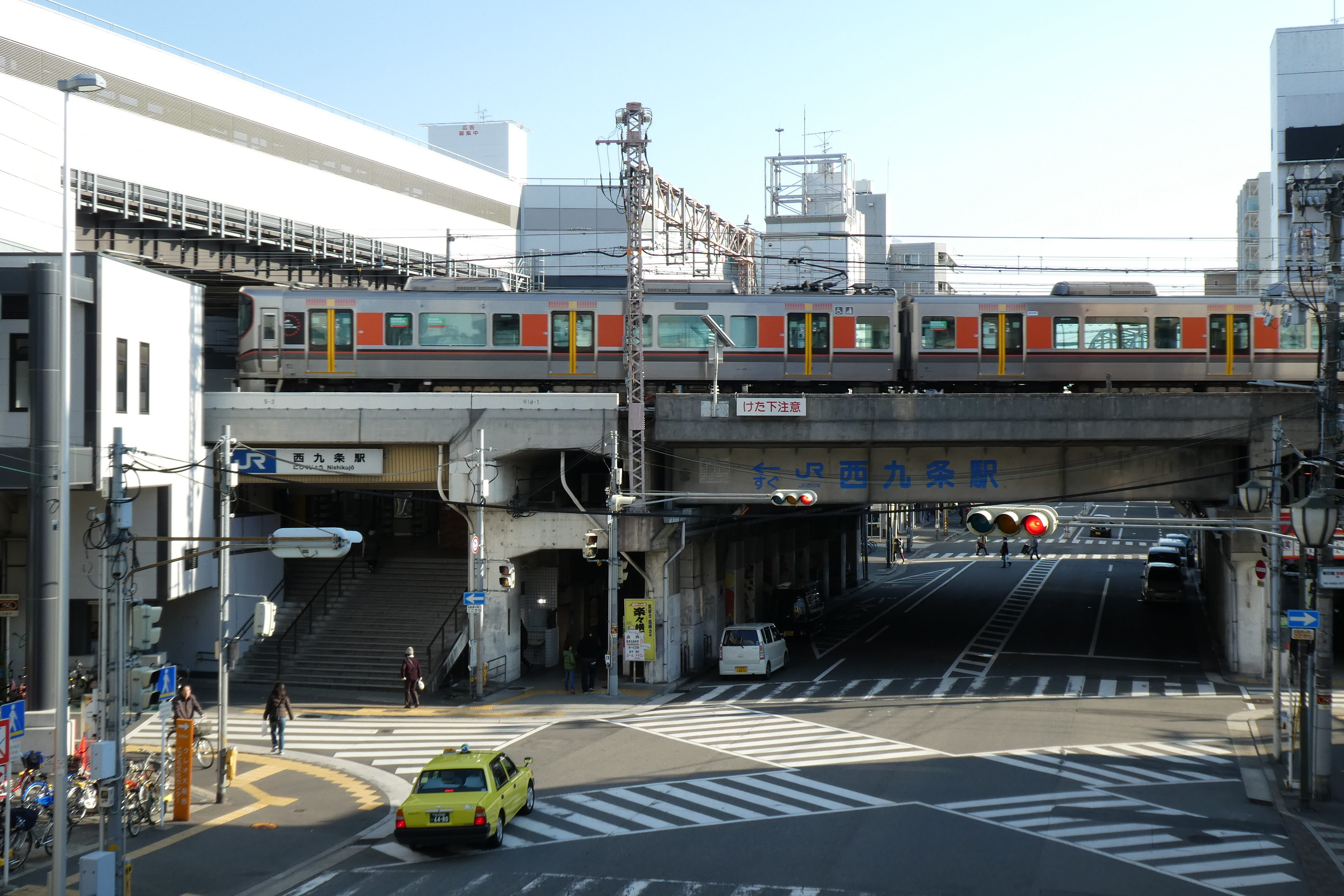 大阪環状線 西九条駅